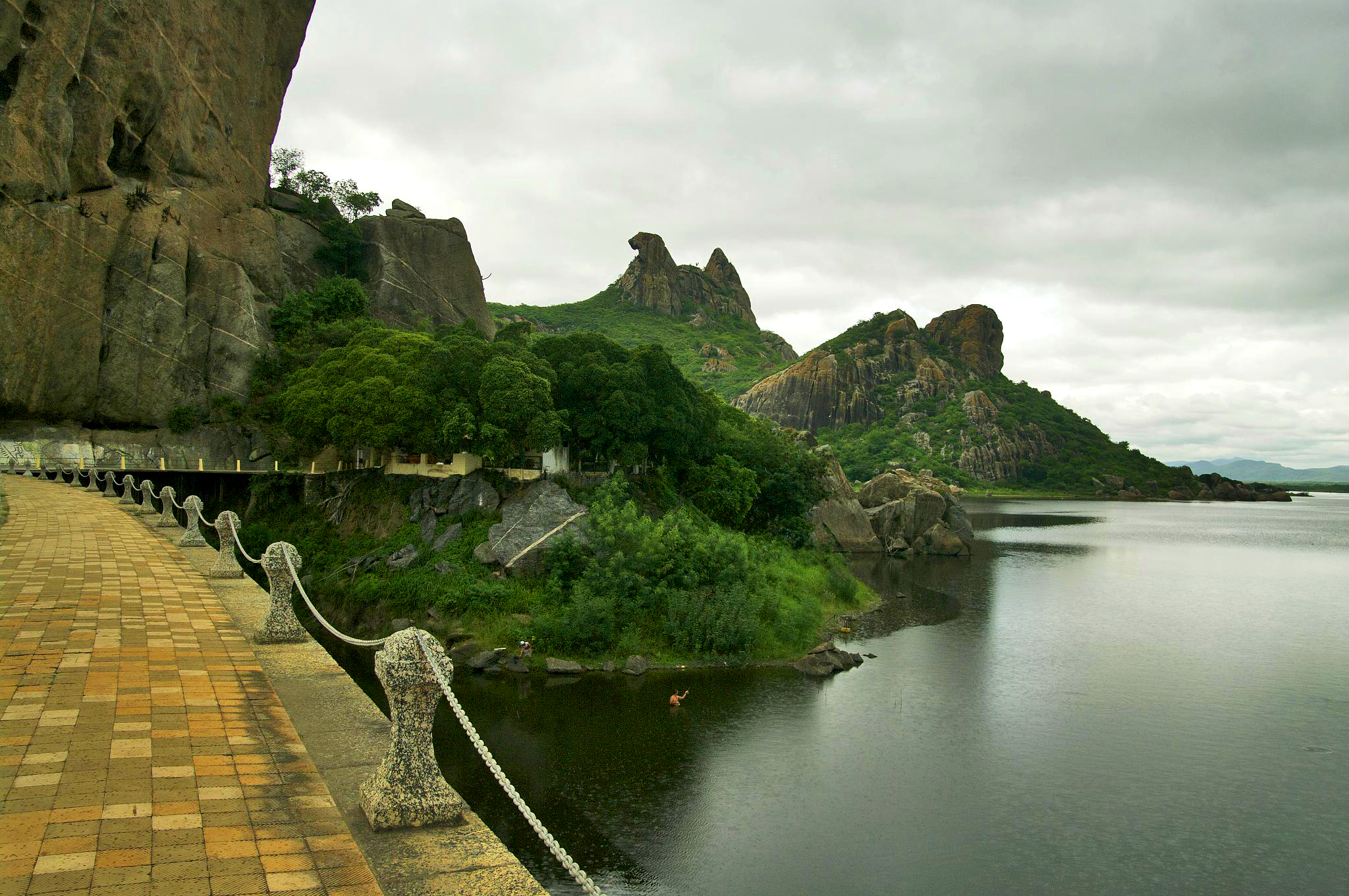 Açude do Cedro (1)